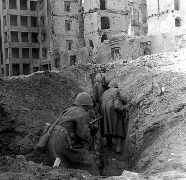 Soldati sovietici della Sessantaduesima armata in azione nelle rovine di Stalingrado